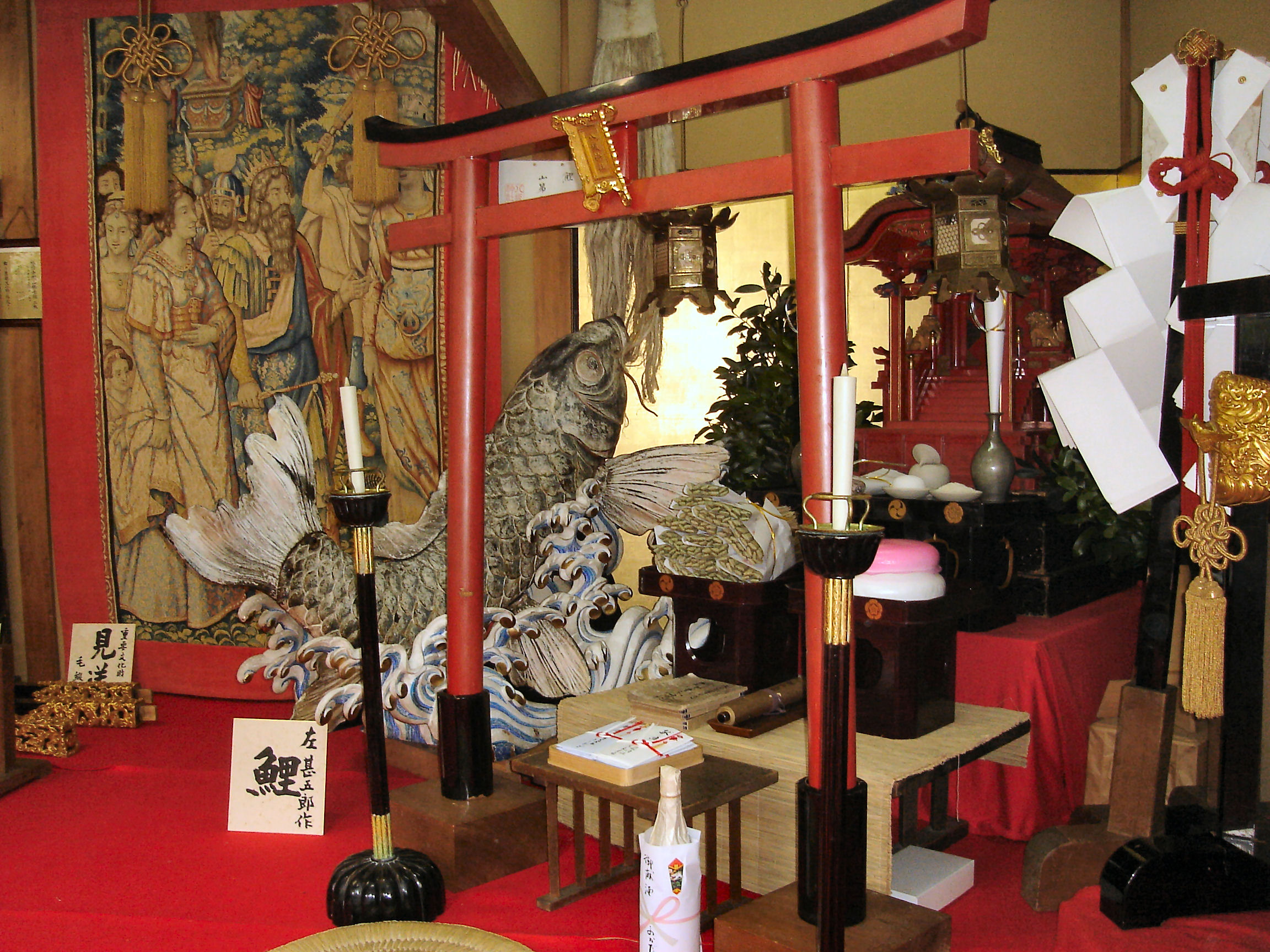 Koia yama decorations(鯉山の飾り物)